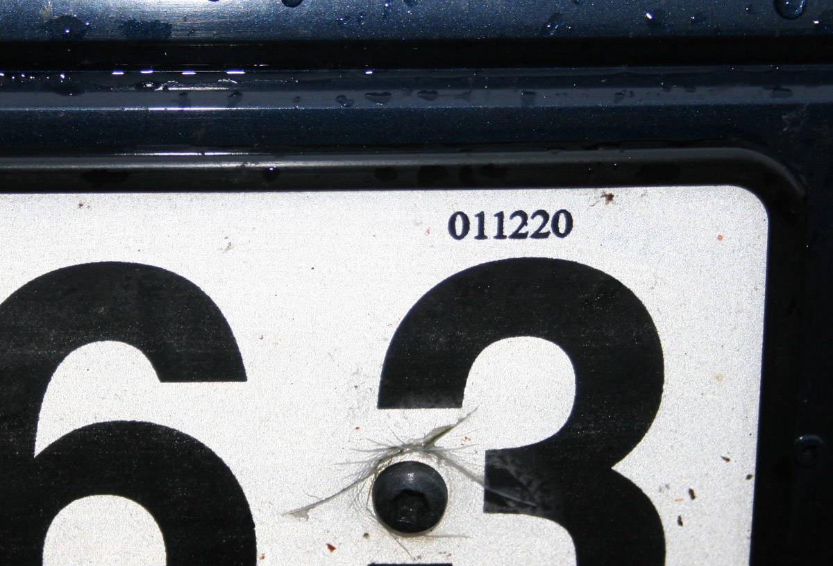 Detalj av registreringsskylt med datum i övre högra hörnet.